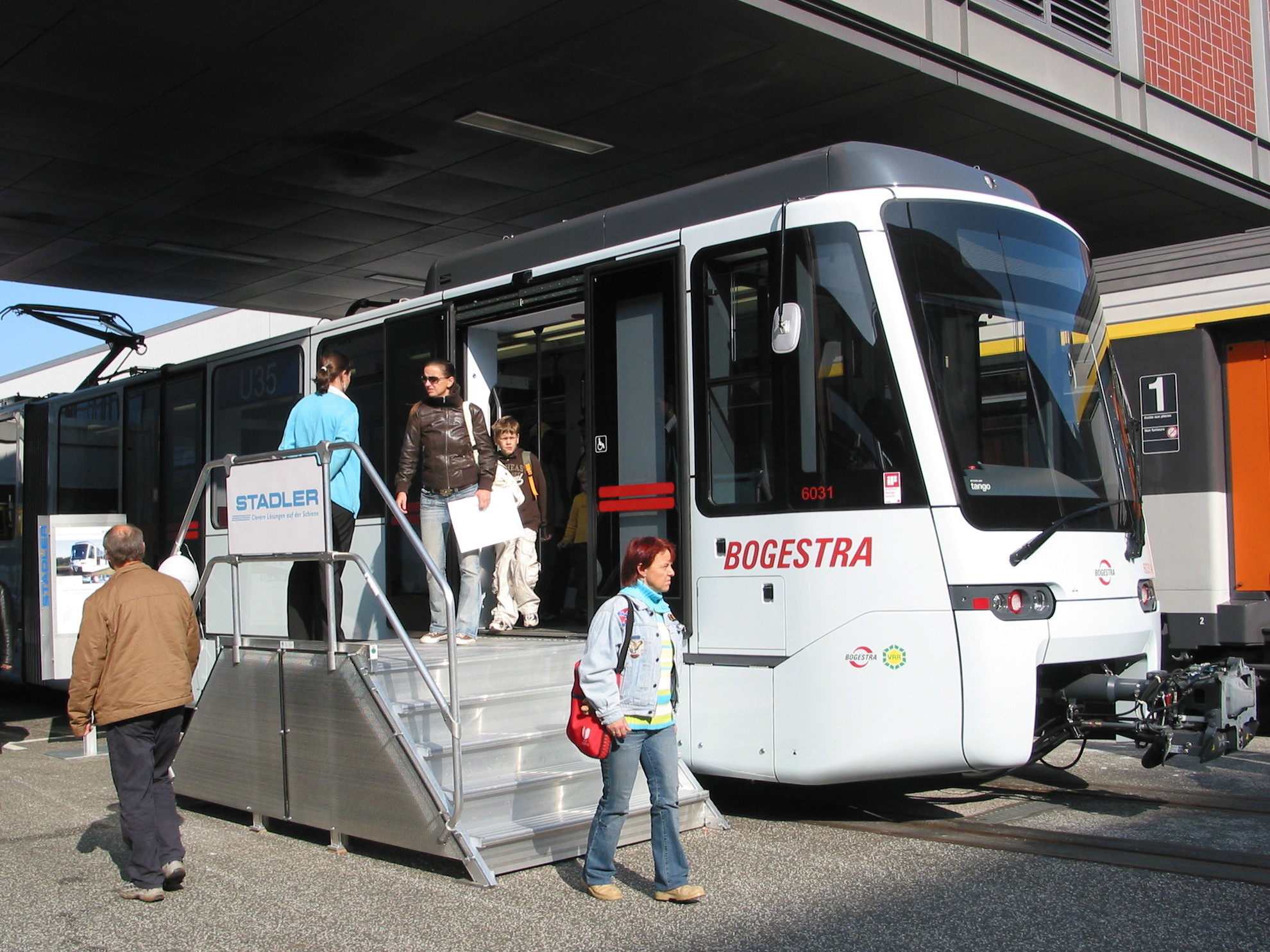 Auf der InnoTrans 2008 hat Stadler Rail den U-Bahntriebwagen (Typ Tango) für die Bochum-Gelsenkirchener-Straßenbahn AG ausgestellt